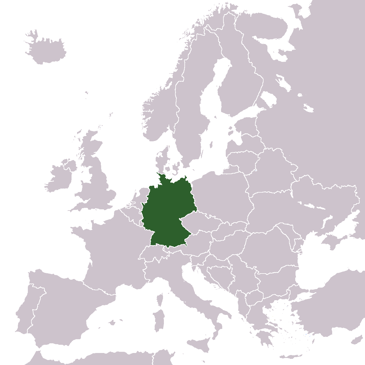 Bildbeschreibung: Lage der BRD in Europa Quelle: Fotograf/Zeichner: Überarbeitet von Kosovac1389 Datum: Juni 2006 andere Versionen